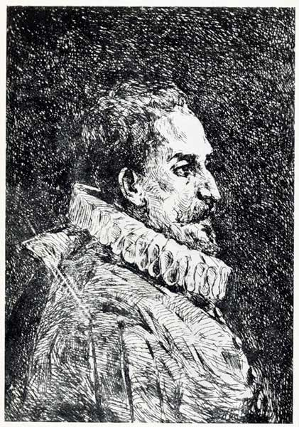 Dibujo y grabado de Miguel de Cervantes.Valencia. Luis Gasca Collection.